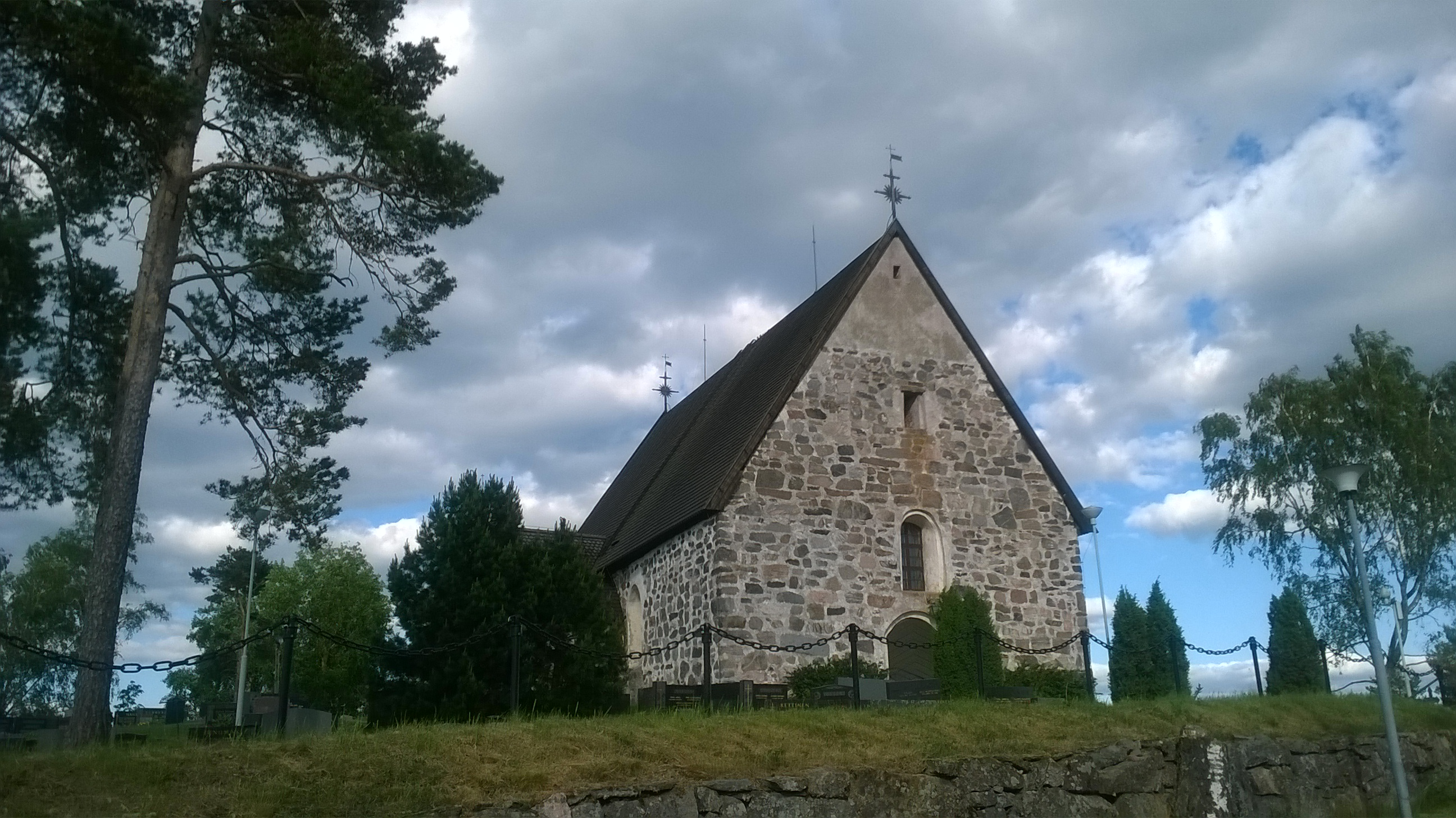 Ruskon kirkko